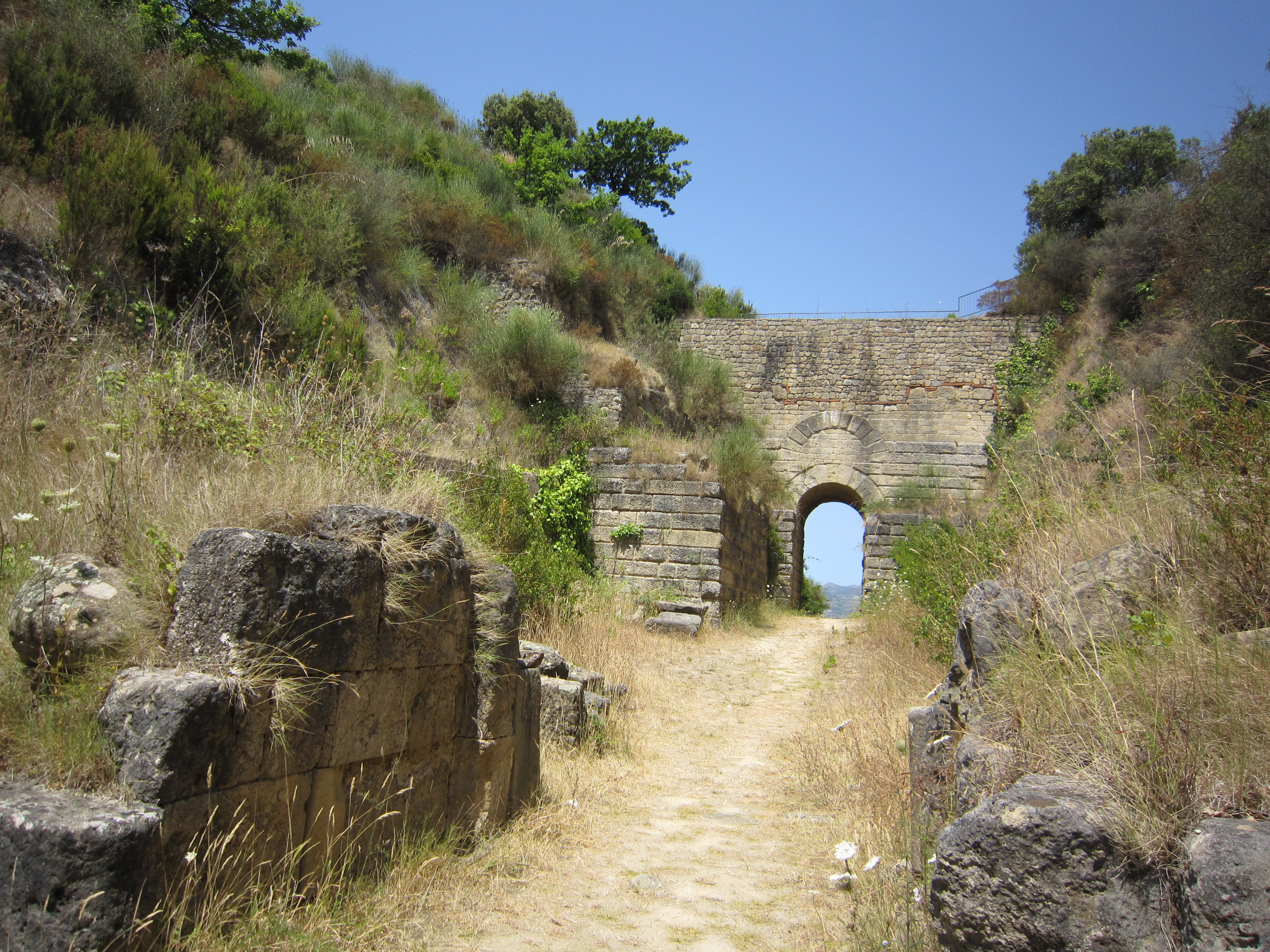 "Porta rosa" di Velia, vista dal quartiere meridionale. In primo piano, i resti della cosiddetta Porta arcaica